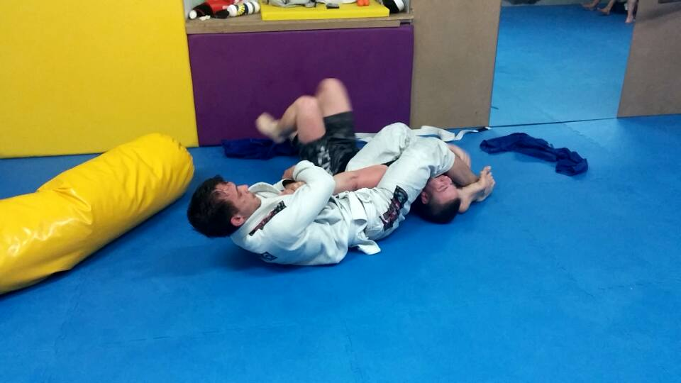 Armbar